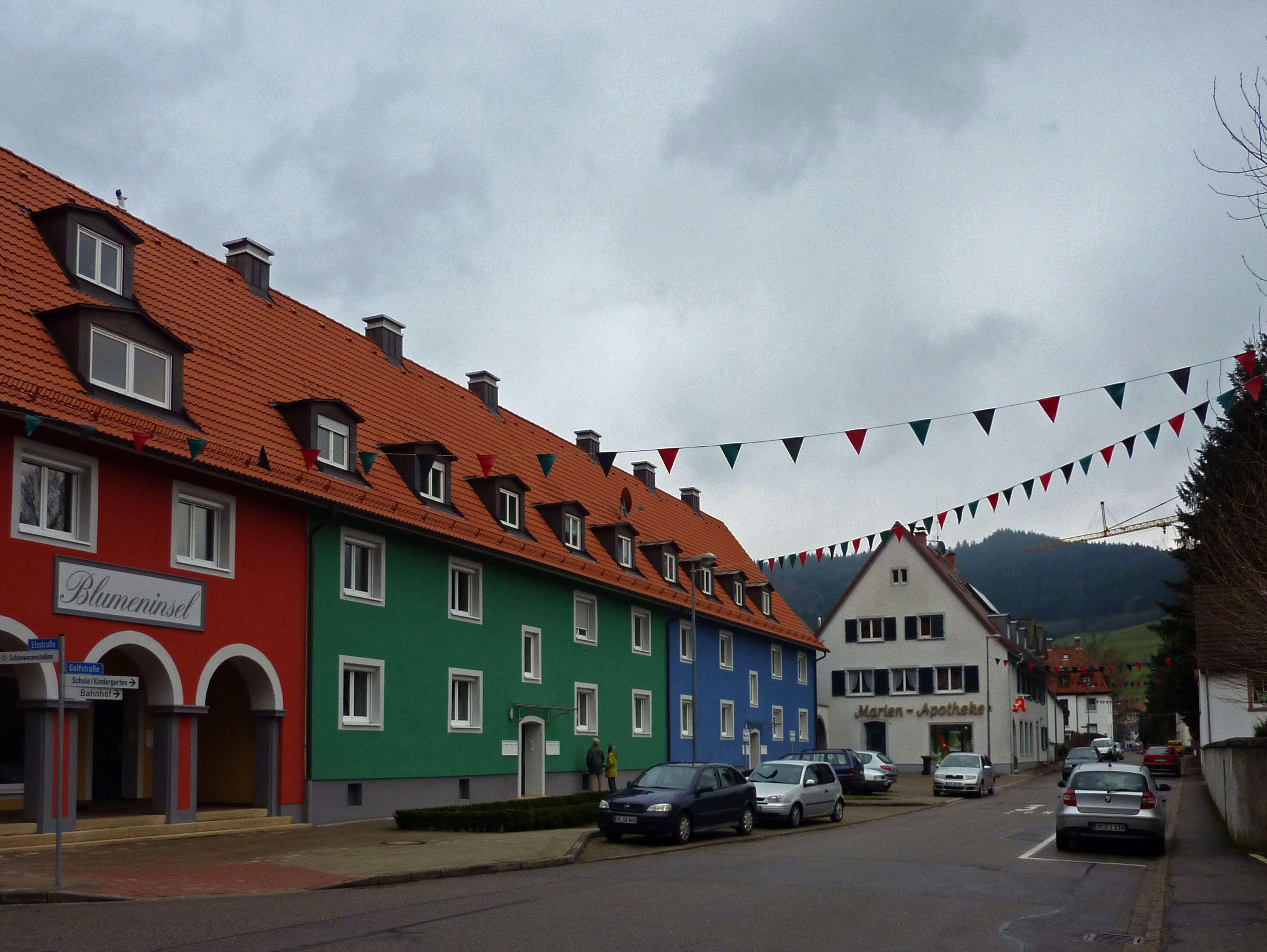 Die Golfstraße in Gutach, geschmückt für Fasnet.